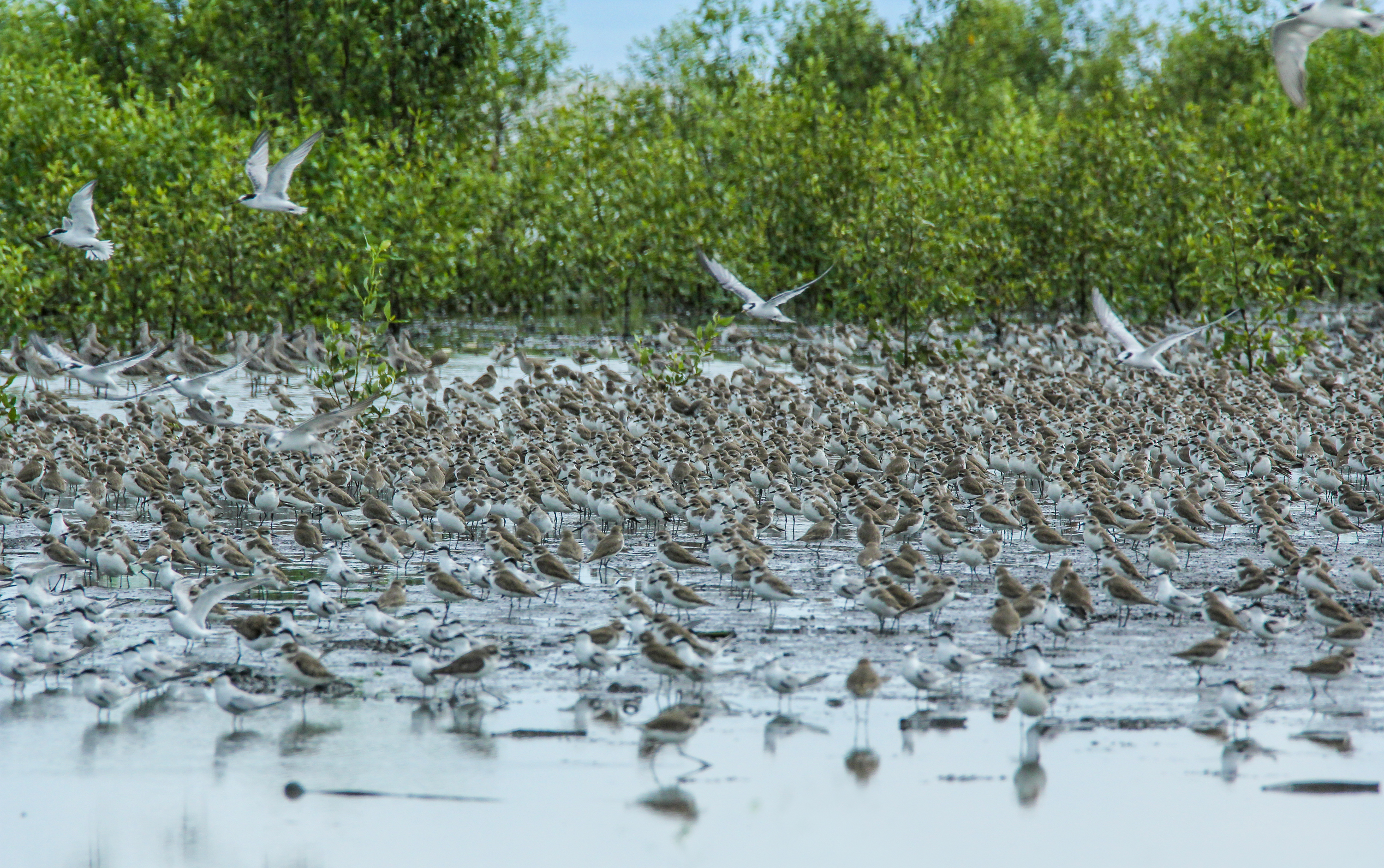 Taman Nasional Sembilang memiliki luas 205.750 hektar terdiri dari lahan basah pesisir alami dengan berbagai ekosistem hutan rawa gambut, rawa air tawar, hutan mangrove, dan dataran lumpur. Setiap tahun Taman Nasional Sembilang menjadi tujuan bagi burung dunia atau burung migran. Burung Migran adalah nama sebutan burung-burung asal Siberia, Mongolia maupun Tiongkok yang melakukan migrasi ke Australia dan Indonesia. Mereka melakukan migrasi karena di tempat asalnya sedang mengalami musim dingin sehingga mereka pindah untuk mencari lokasi yang sedang mengalami musim panas antara lain indonesia. Dalam perjalanan, ribuan burung migran mampir ke beberapa tempat di Indonesia antara lain Taman Nasional Sembilang. Lokasi ini diminati karena arealnya merupakan kawasan mangrove yang sangat disukai burung-burung migran. Sehingga di sana bukan saja untuk mencari makan bahkan bertelur. Kegiatan ini merupakan siklus kehidupan Burung Migran setiap tahunnya. Lokasi : Taman Nasional Sembilang, Kabupaten Banyuasin, Sumatera Selatan.